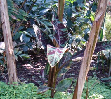 Musa acuminata (Syn.: M. zebrina), Bot. Garden Berlin